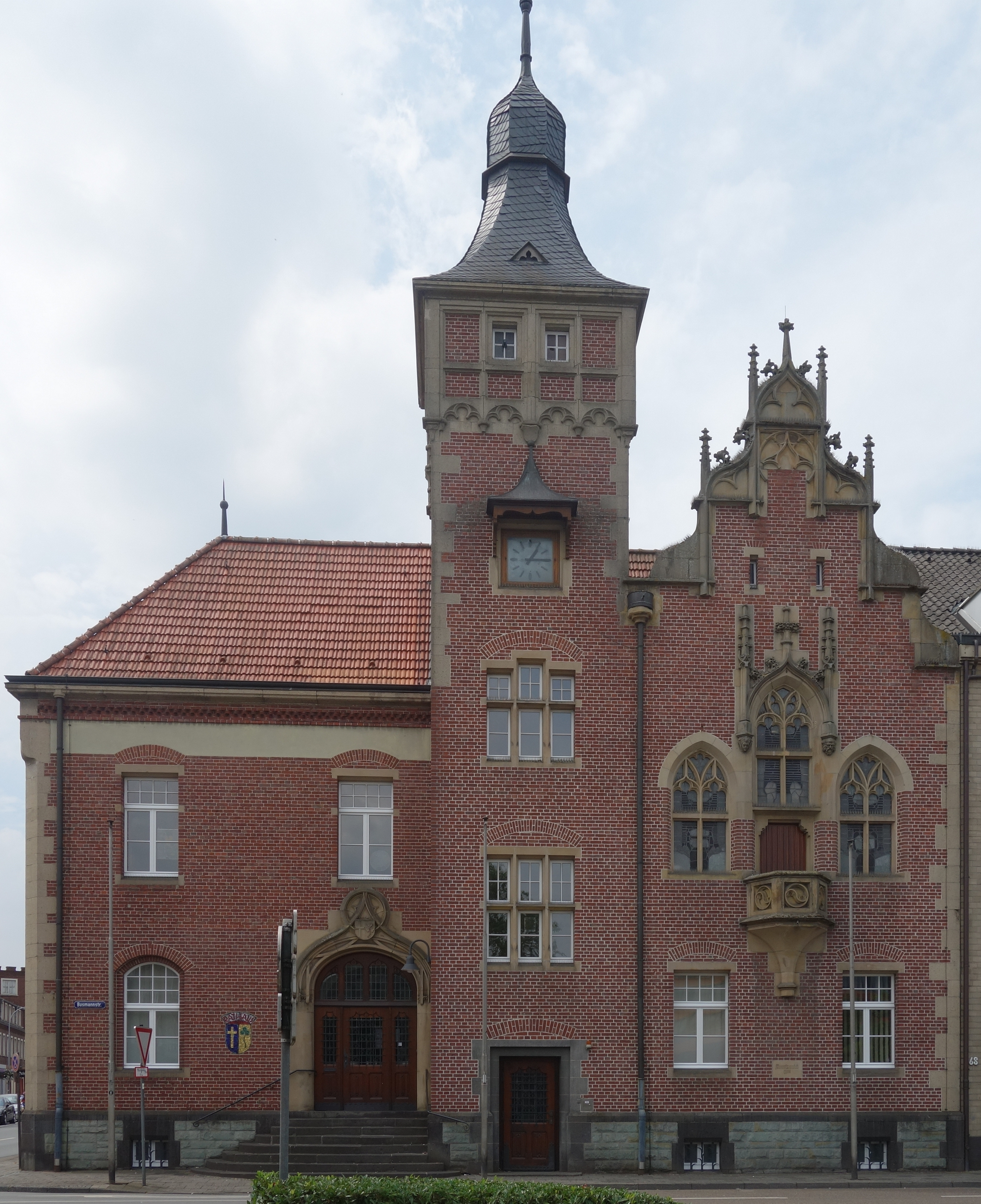 Altes Rathaus in Kevelaer